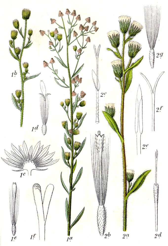 1. Conyza canadensis (L.) Cronquist, syn. Erigeron canadensis L. 2. Erigeron acris L. Original Caption 1. Echtes Franzosenkraut, Erigeron canadensis 2. Gemeines Berufkraut, E. acris